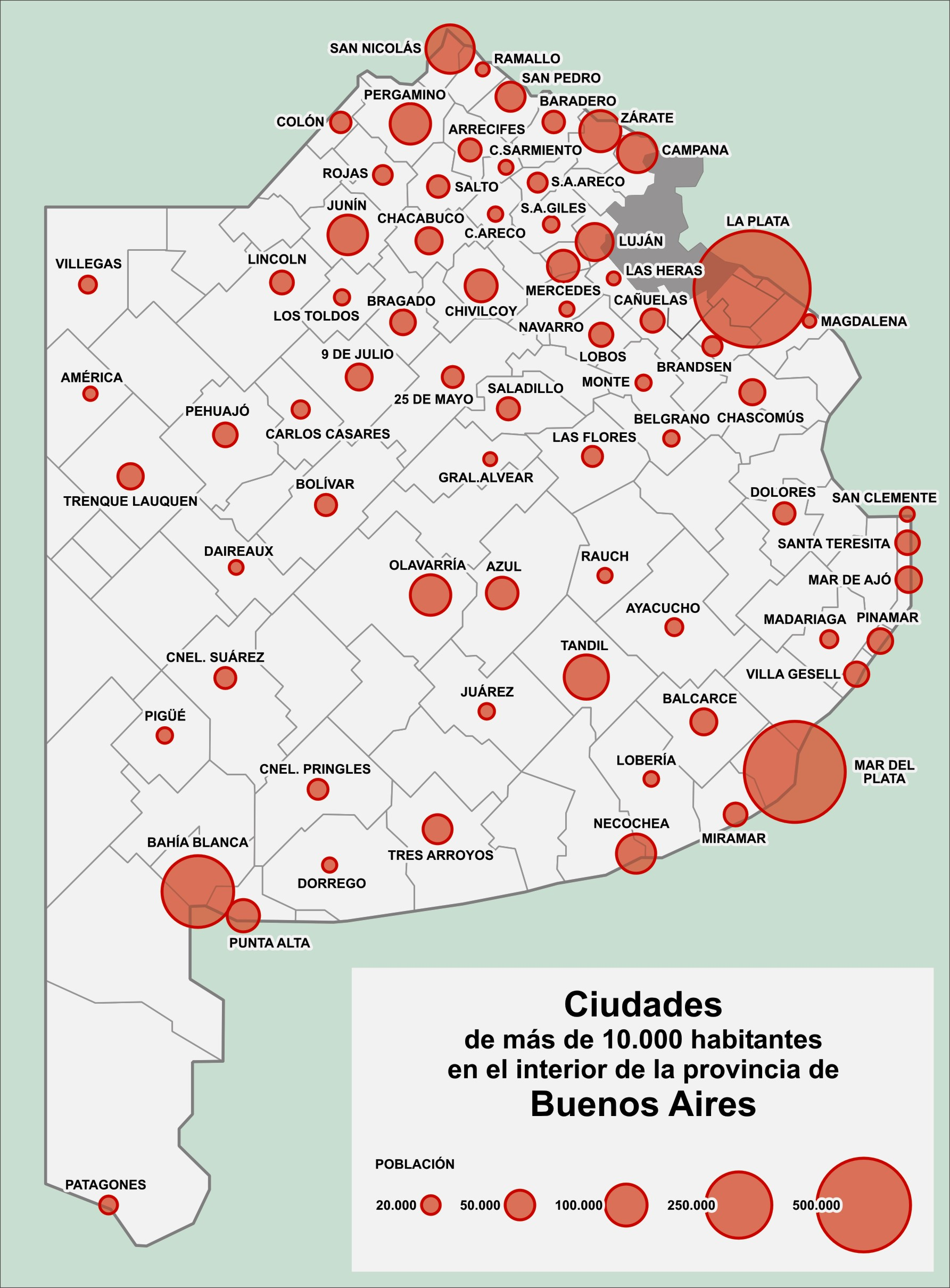 Ciudades de más de 10.000 habitantes en la provincia de Buenos Aires, Argentina.